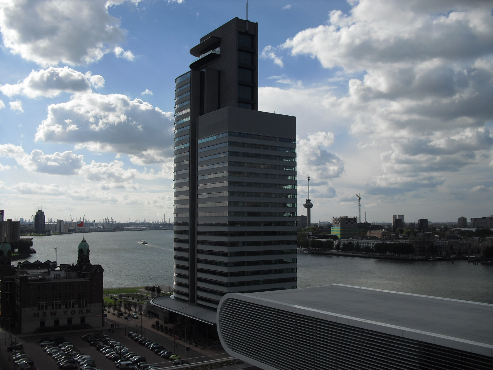 World Port Center in Rotterdam